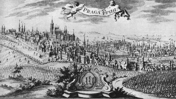 Praha roku 1740